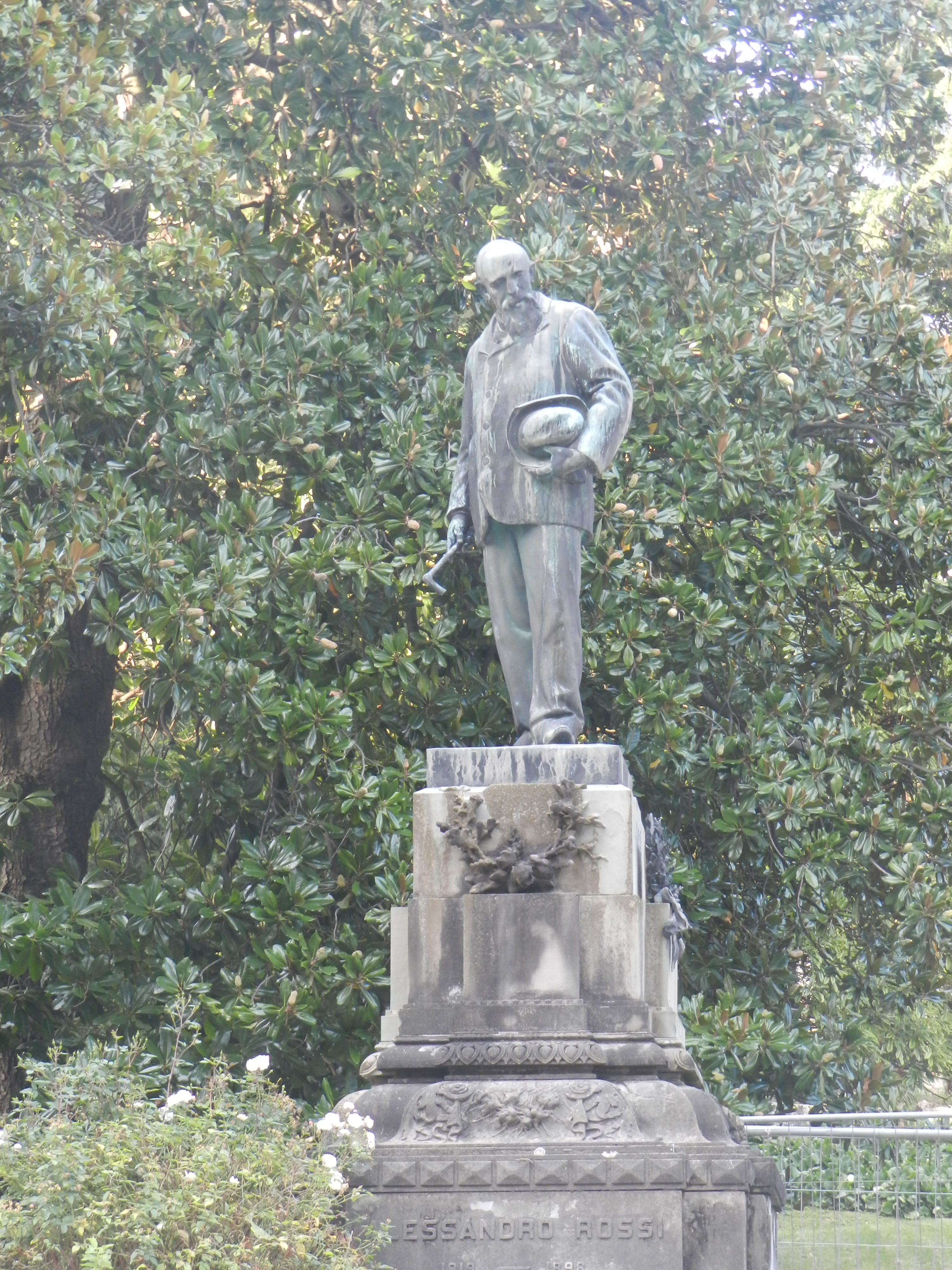 Teatro Jacquard, Schio This is a photo of a monument which is part of cultural heritage of Italy.